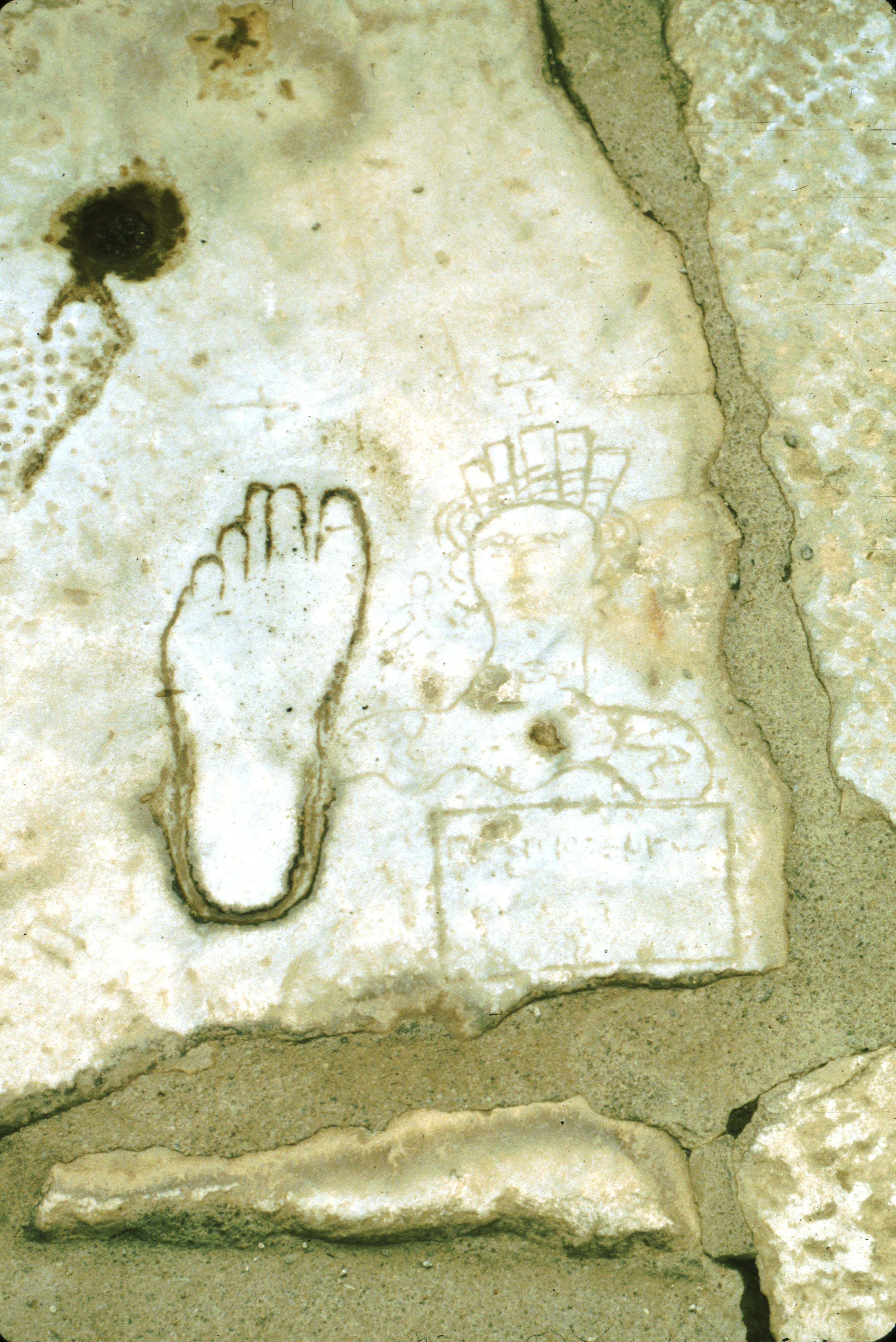 Angeblicher antiker Wegweiser zum Bordell von Ephesus